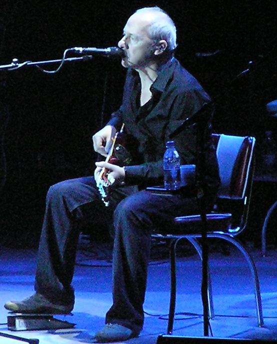 Mark Knopfler Konzert Hamburg 28.05.2006